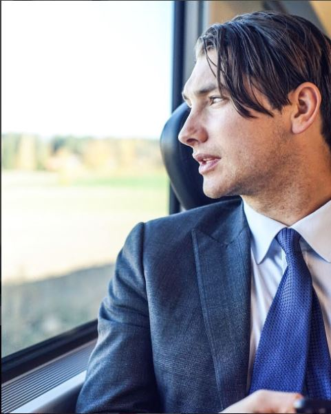 Alexander Pärleros